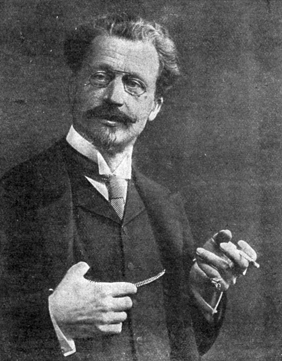 Маковский, Александр Владимирович